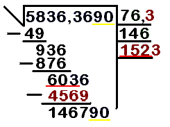 Paso número 6 de la raiz cuadrada.